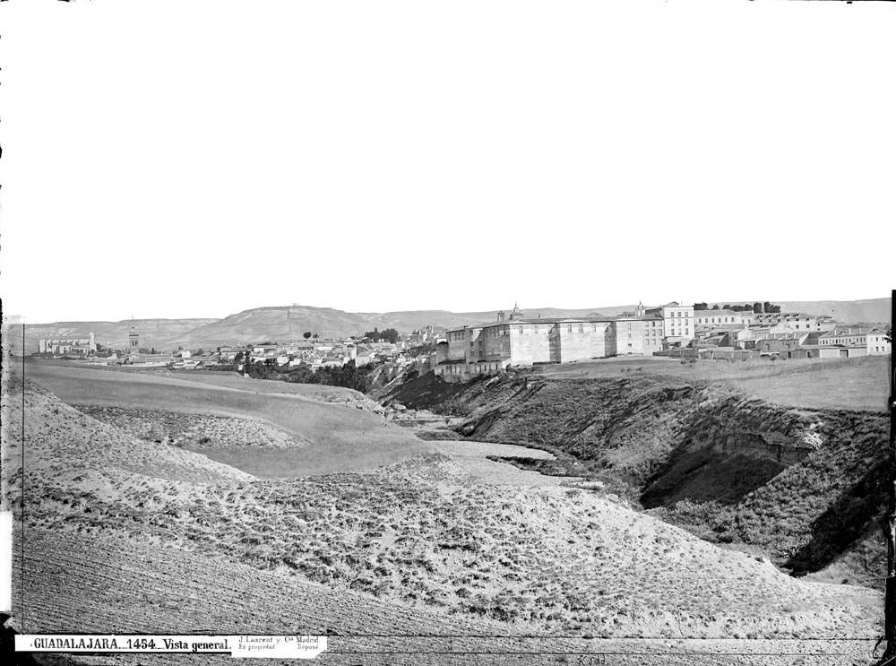 Vista de la ciudad de Guadalajara hacia 1872